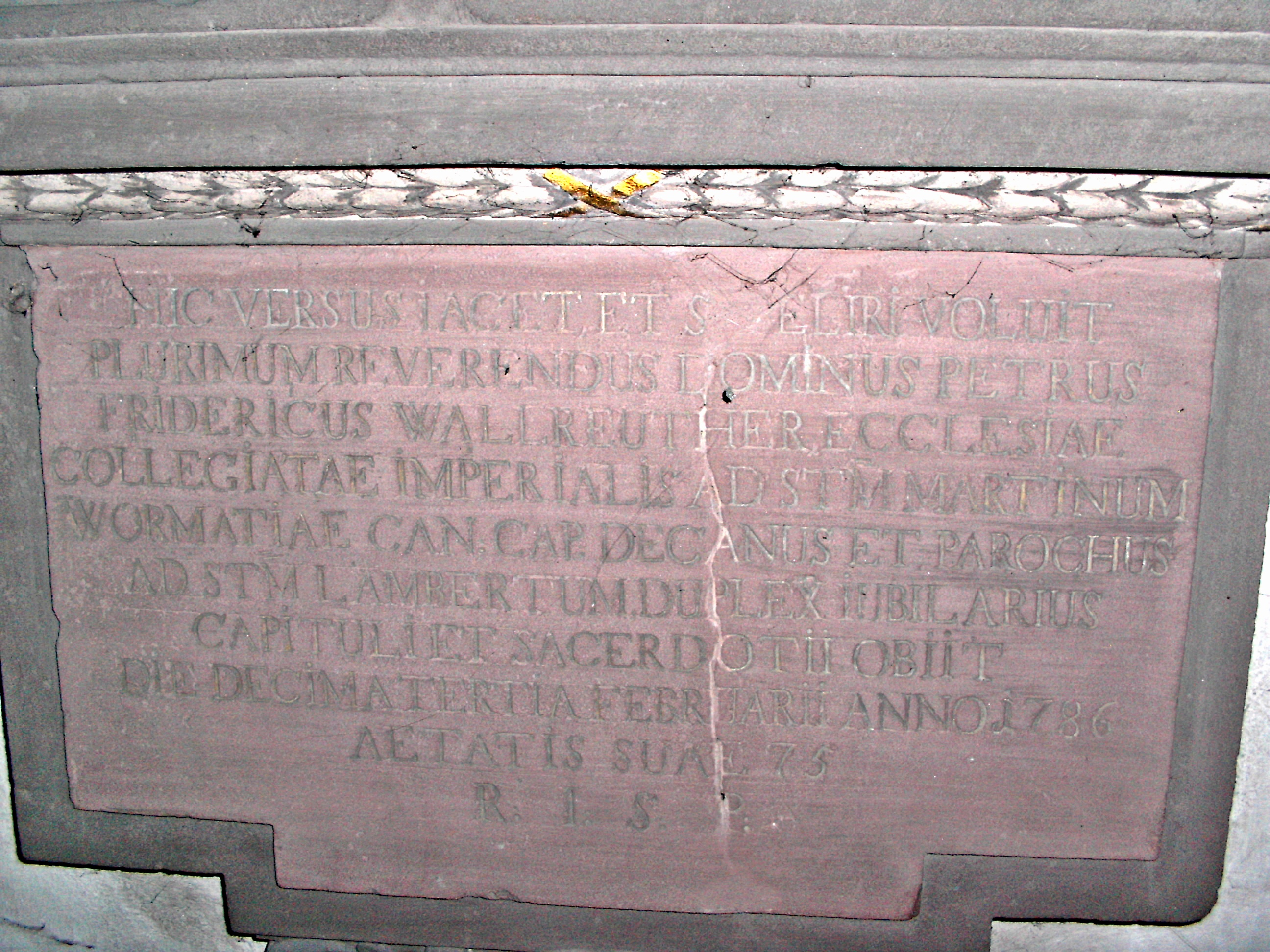 Epitaph Stiftsdekan Peter Friedrich Wallreuther, Martinskirche Worms (Inschrift)